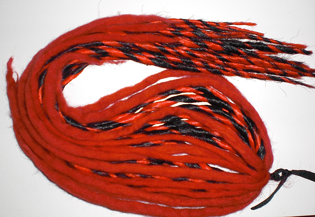 Synthetische Cyber-Dreadlocks